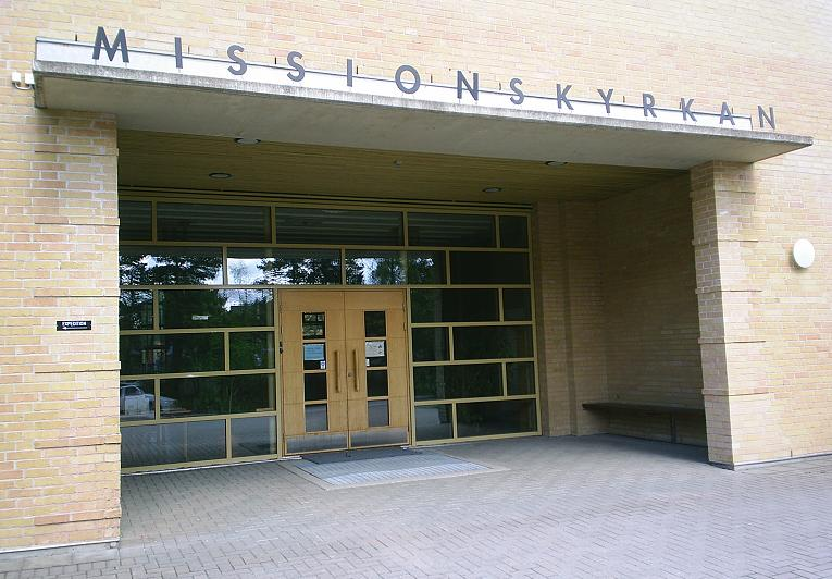 Missionskyrkan i Trollhättan (vid Hjortmossen). Foto av CNB